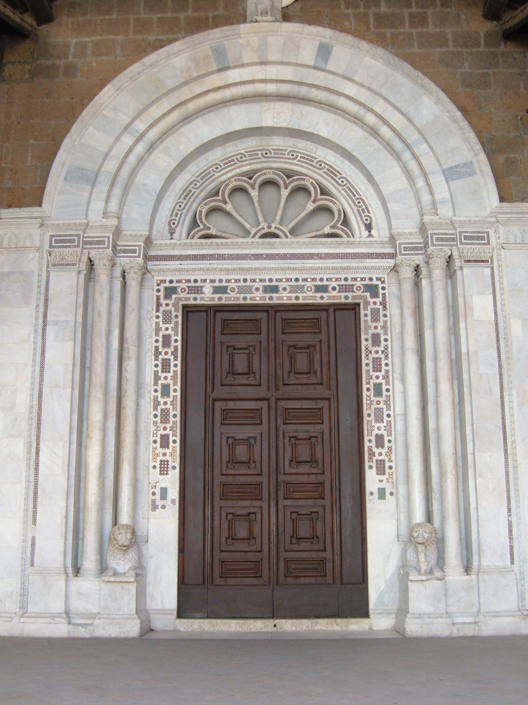 Duomo (Civita Castellana)